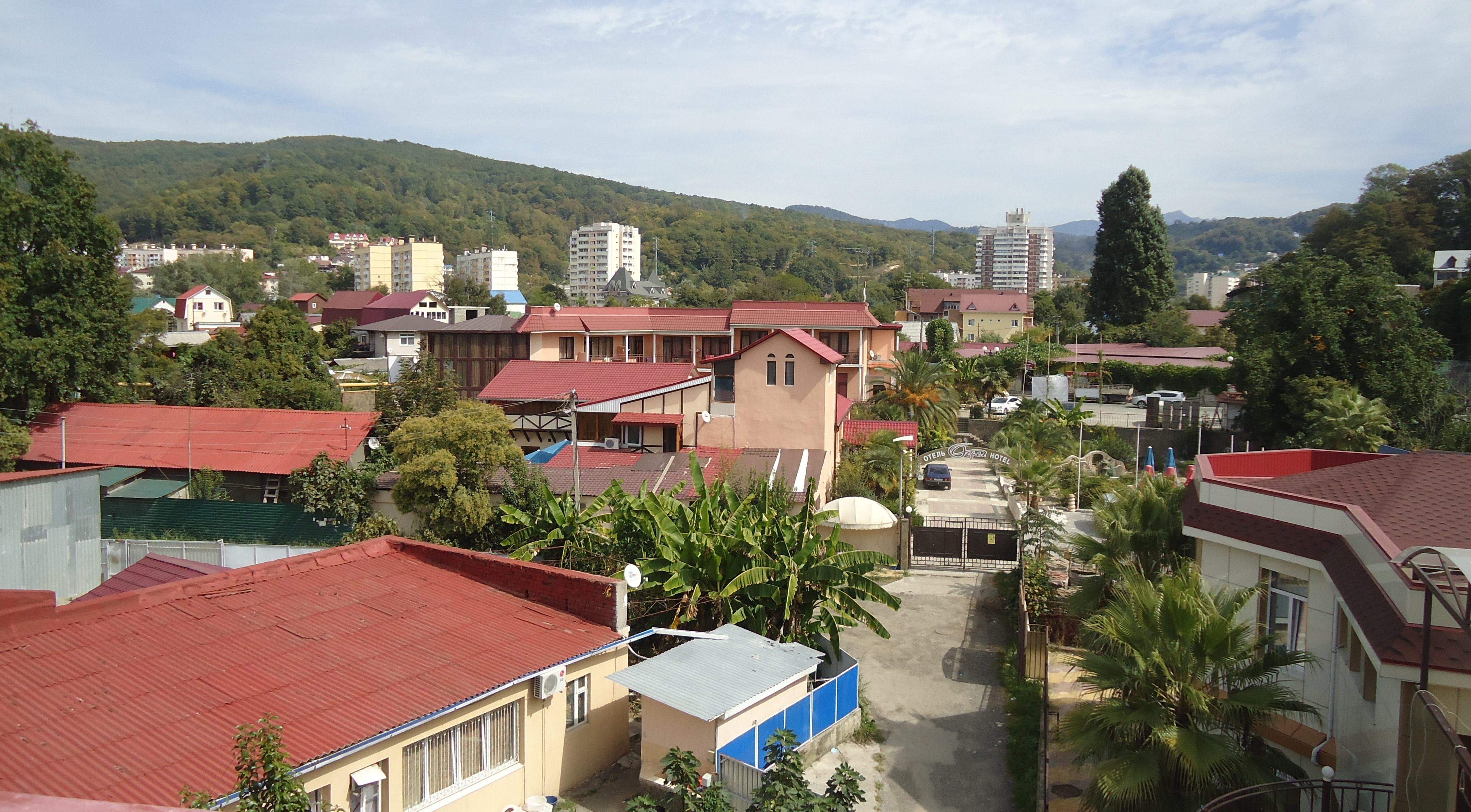 Кудепста. Вид на Кудепсту с Кудепстинского виадука